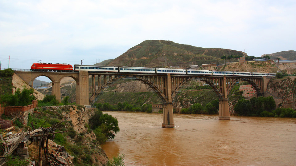 包兰铁路桑园峡黄河铁路大桥